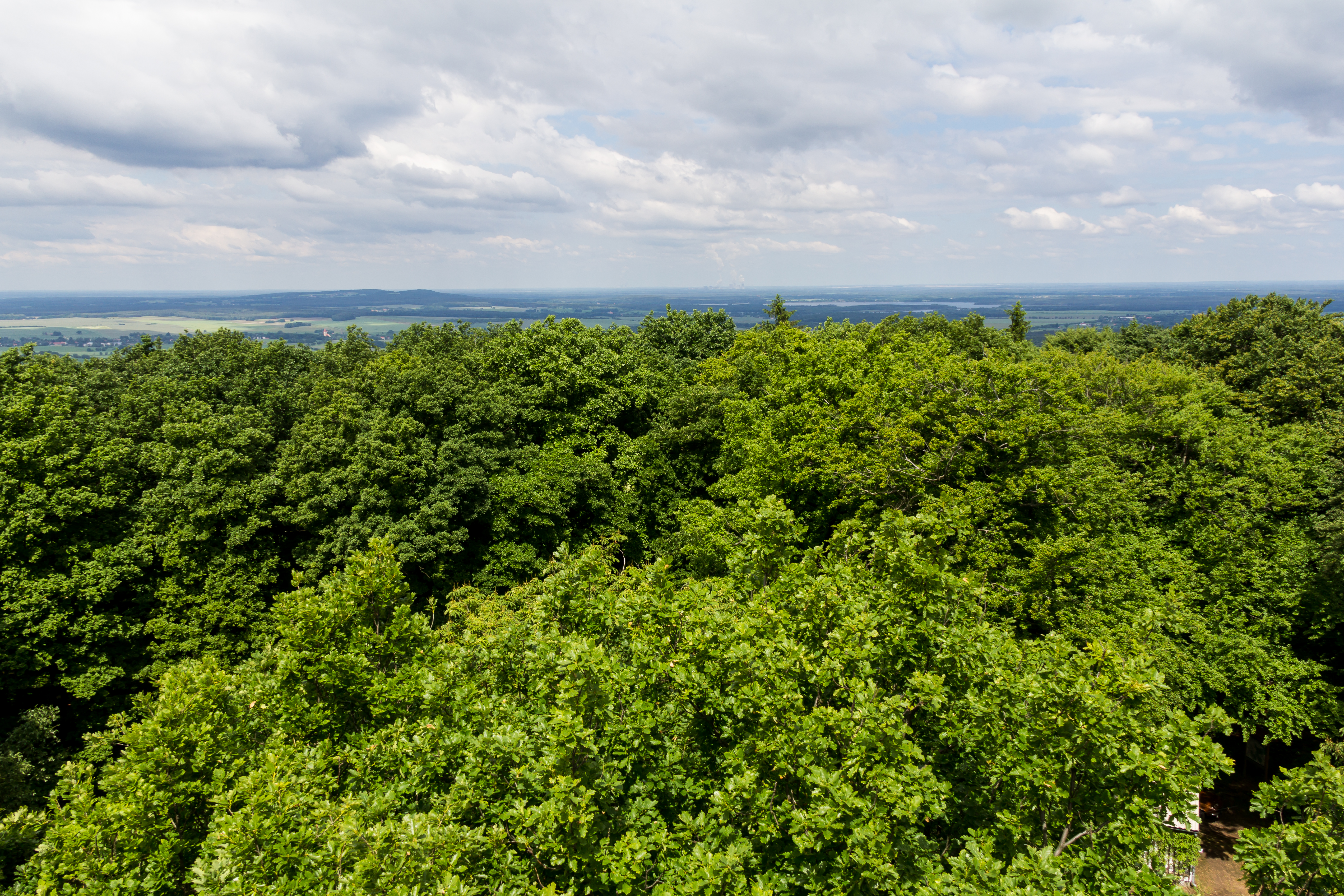 Laubwälder der Königshainer Berge im Landschaftsschutzgebiet Königshainer Berge (LSG-Nr. d 09). Blick vom Aussichtsturm auf dem Hochstein